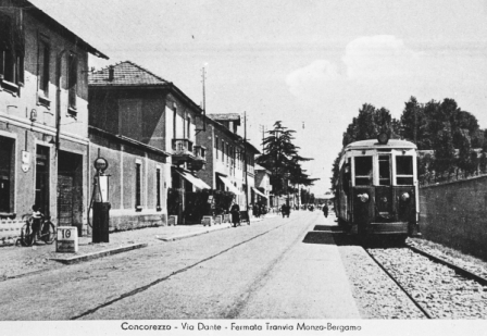 Concorezzo, via Dante